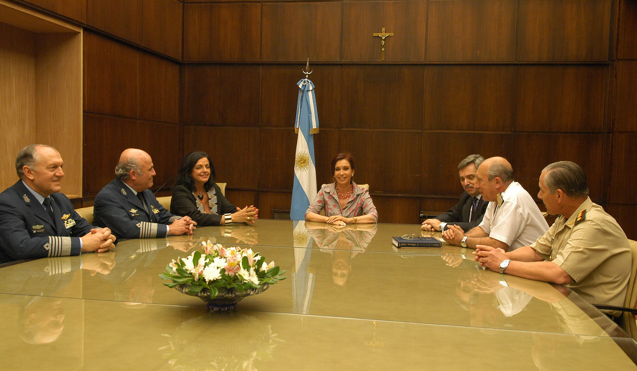 La presidenta electa Cristina Fernández reunida con la ministra de Defensa Nilda Garré, el Jefe de Gabinete Alberto Fernández y representantes de las Fuerzas Armadas